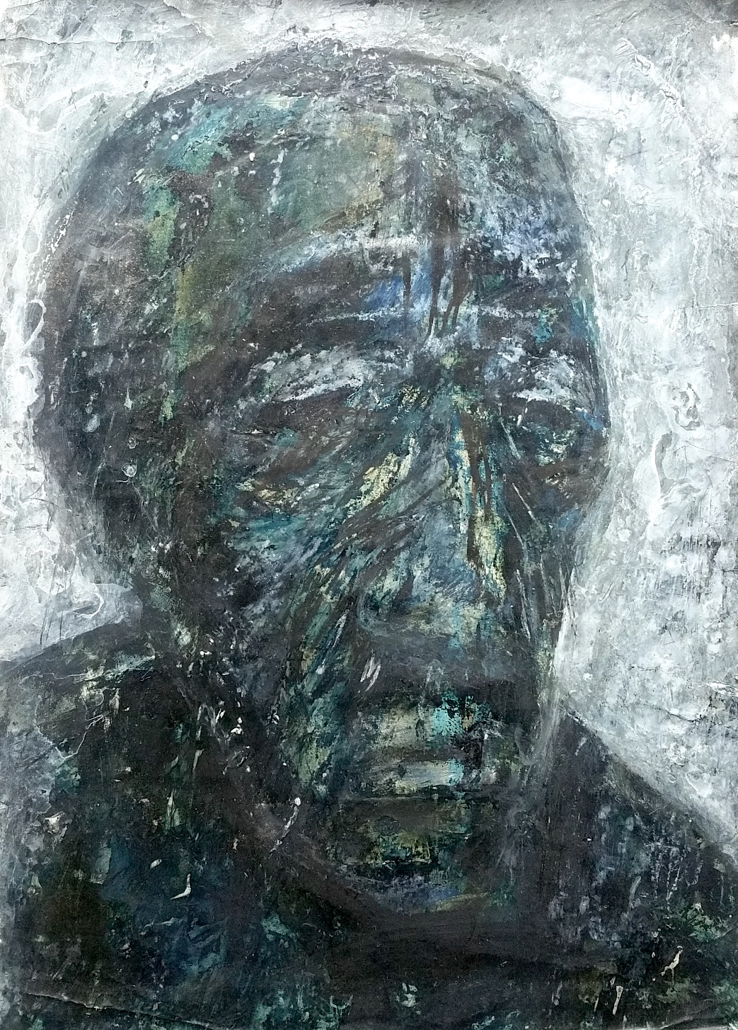 Elisabeth Bunge-Wargau. Gesicht